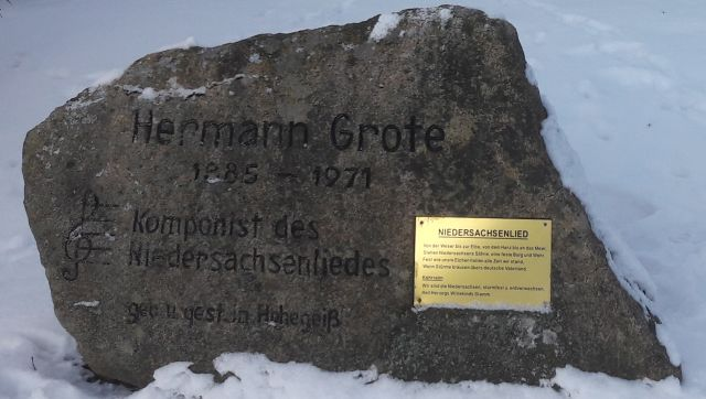 Gedenkstein von Hermann Grote in Hohegeiß vor dem Museuem "Alte Pfarre", Lange Str. 54, 38700 Braunlage